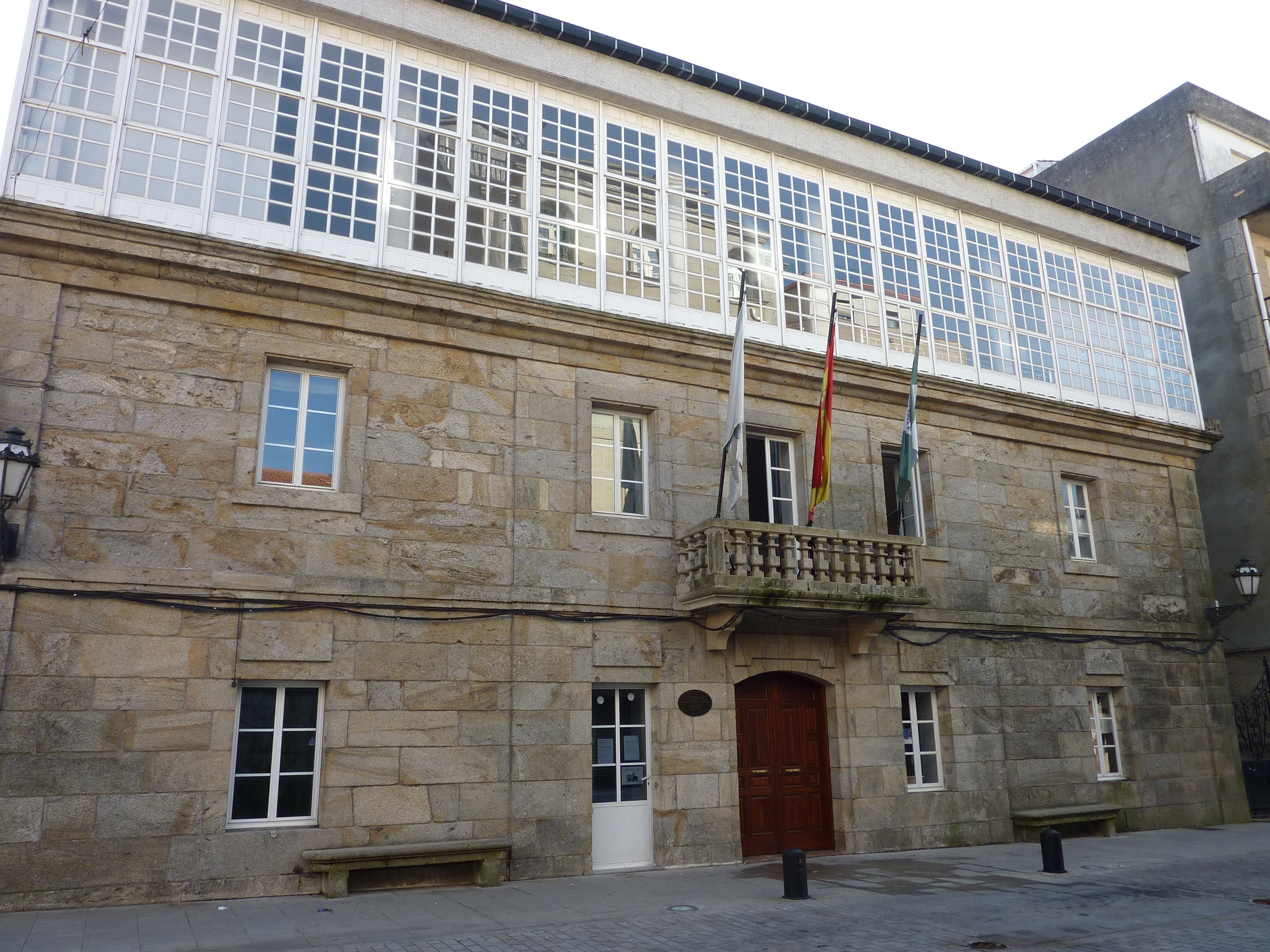 Foto del ayuntamiento de A Cañiza